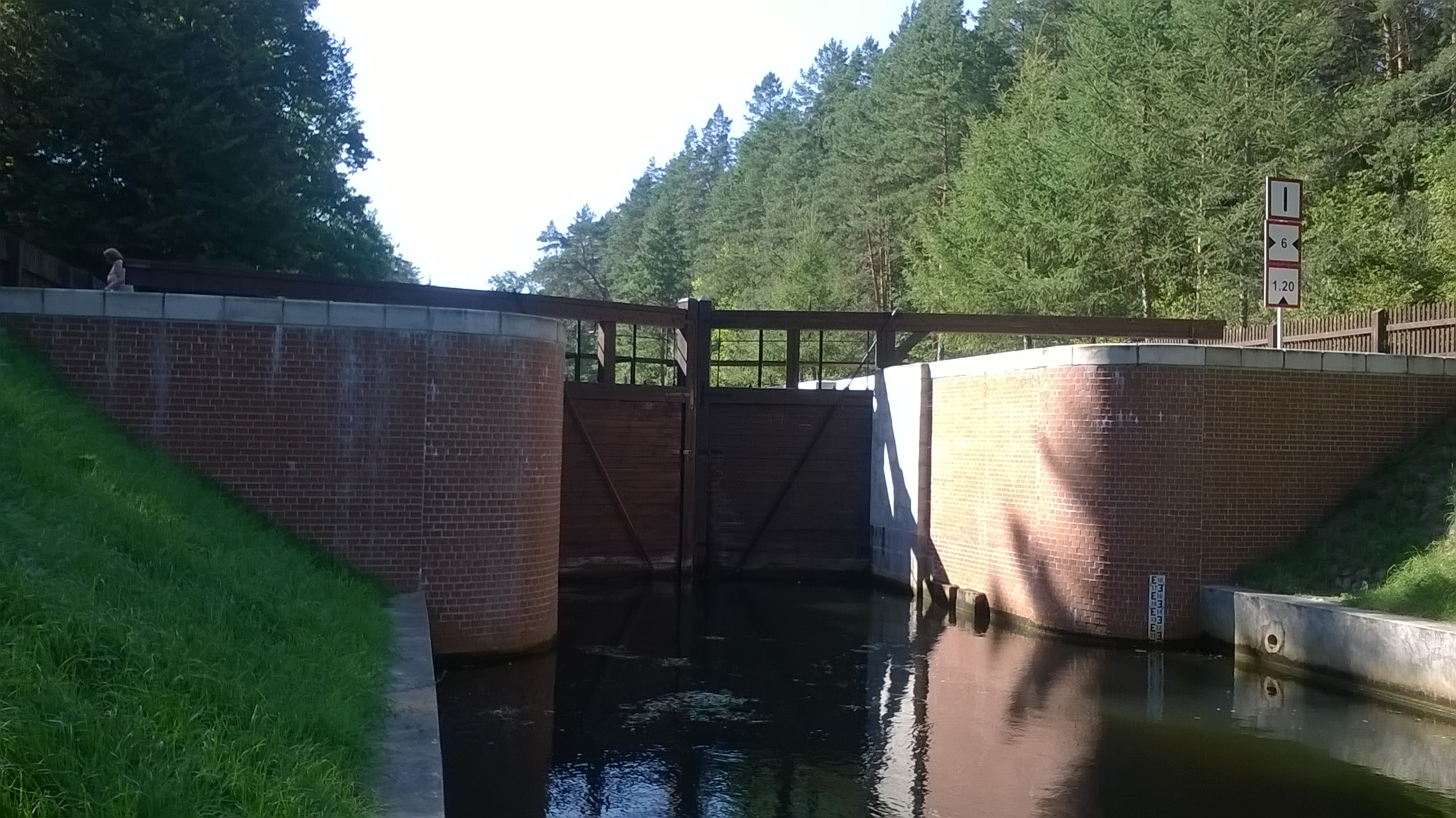 Widok na dolne wrota śluzy